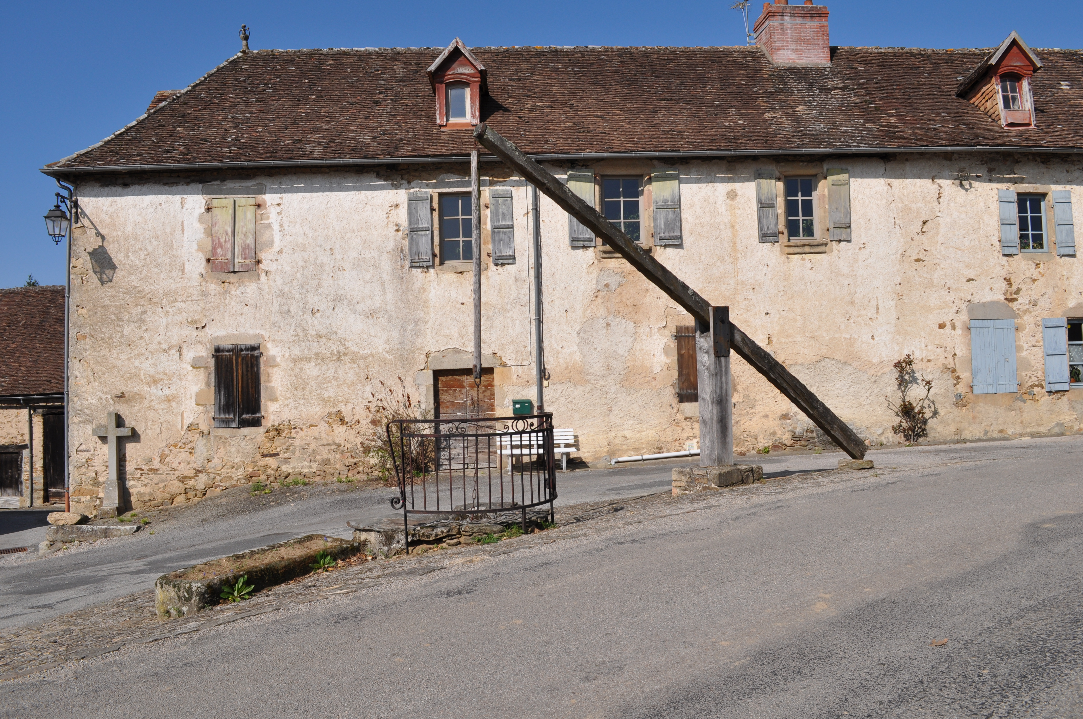 Le puits à balancier de Vicq-sur-Breuilh